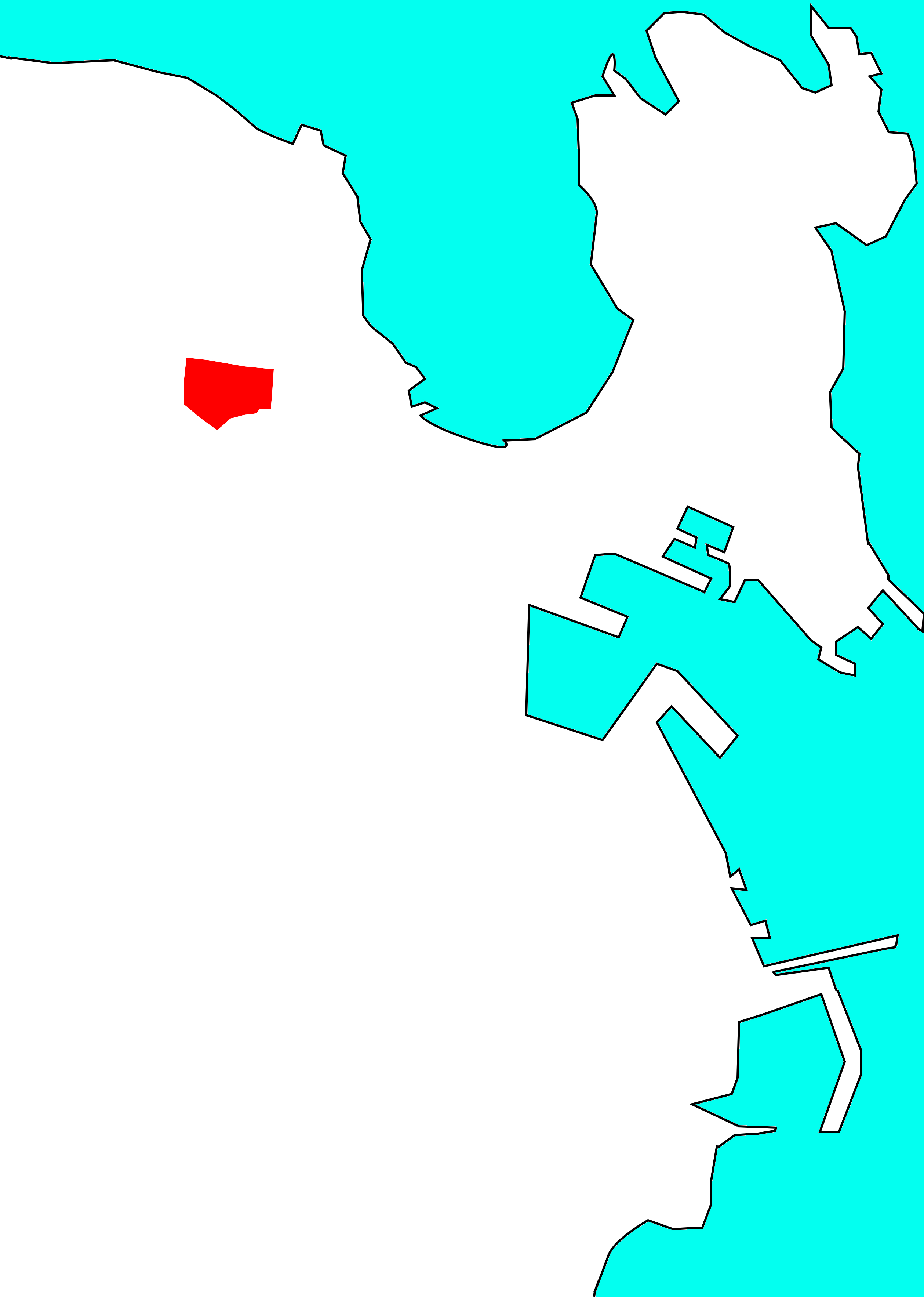 Situación do Peruleiro no concello da Coruña.[1]